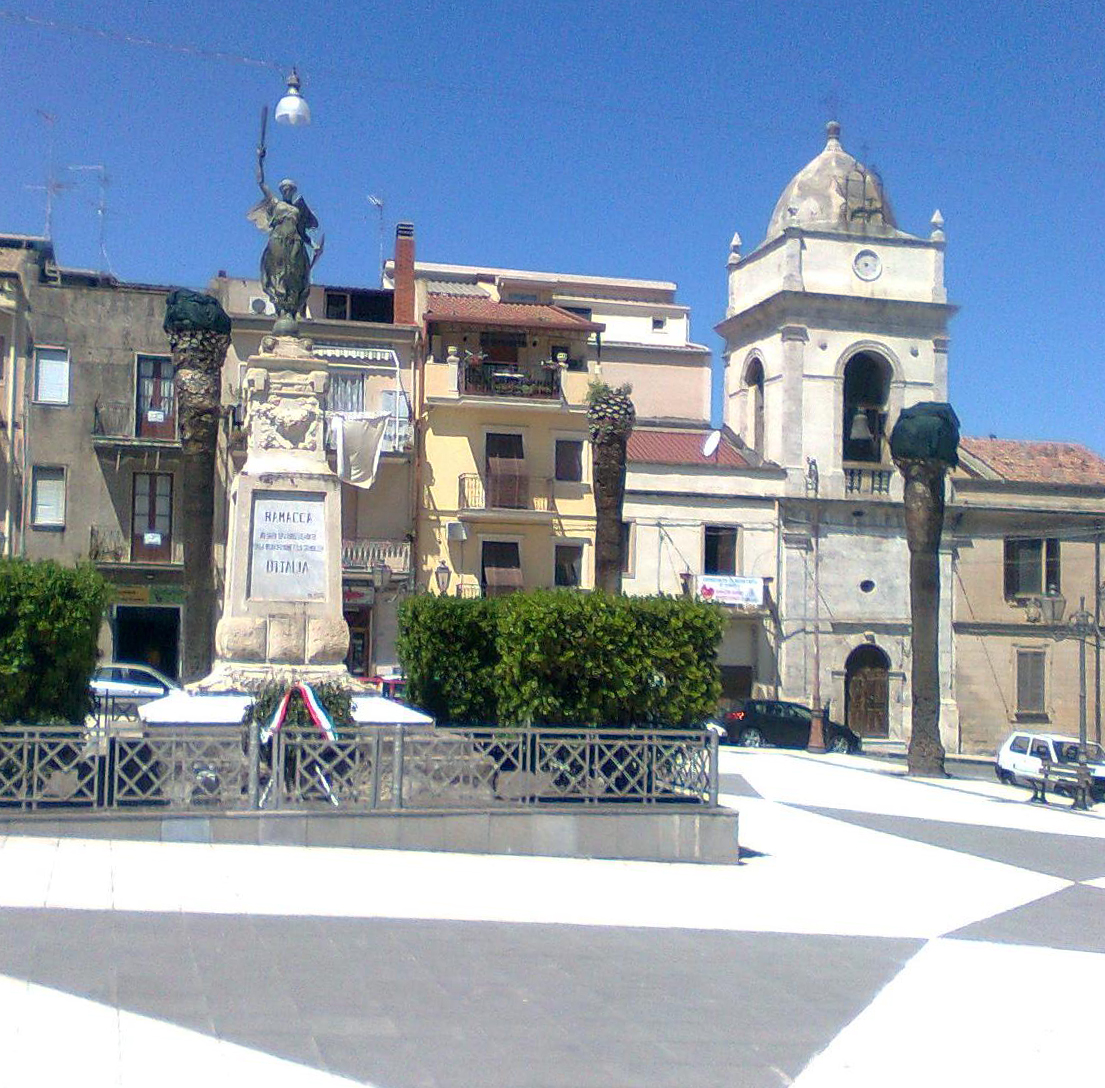 Ramacca, Sicily, Regina Elena Square